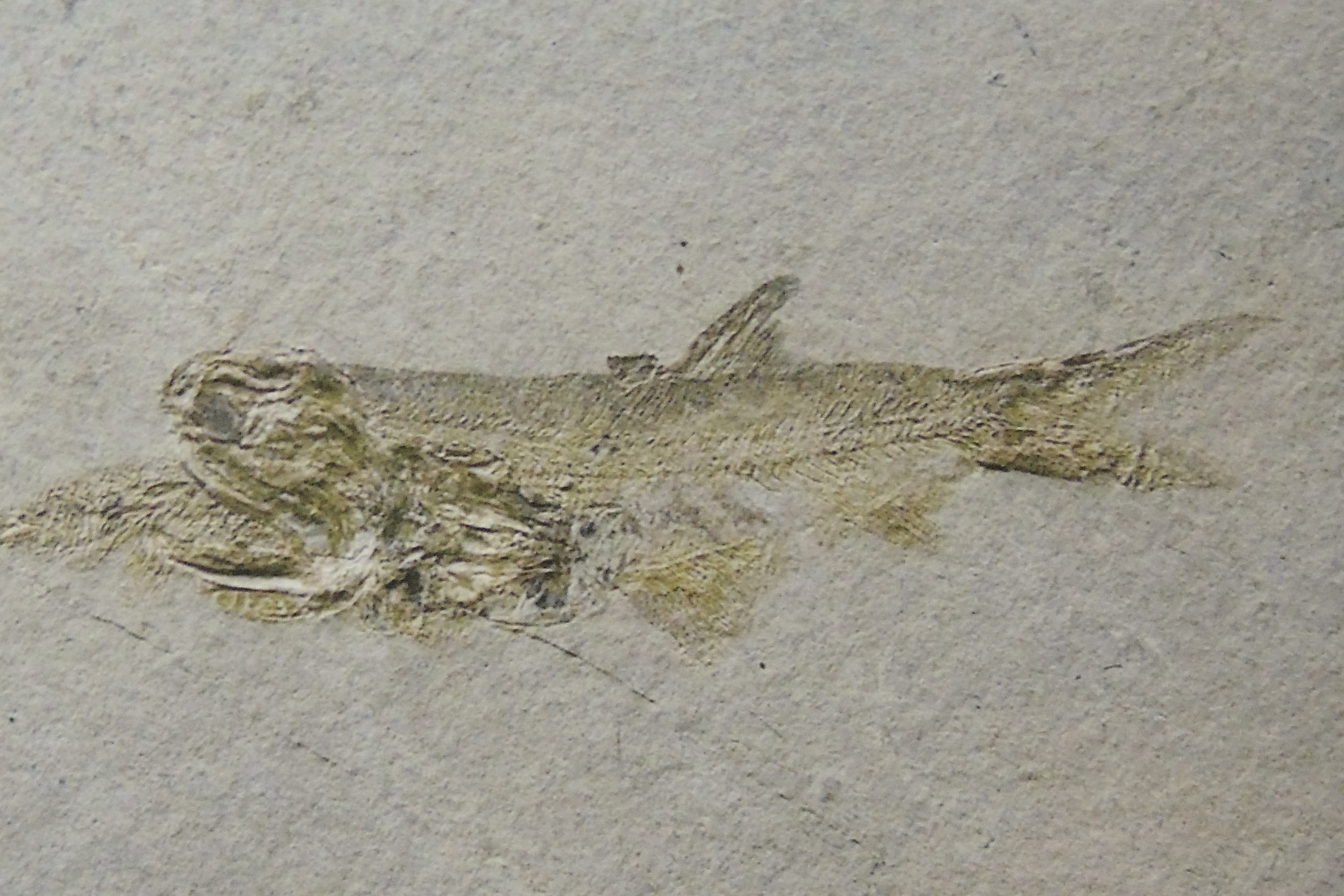 Рыба кокколепис Coccolepis aniscowitchi. Казахстан, местонахождение Каратау, верхняя юра. Музей естественной истории Татарстана